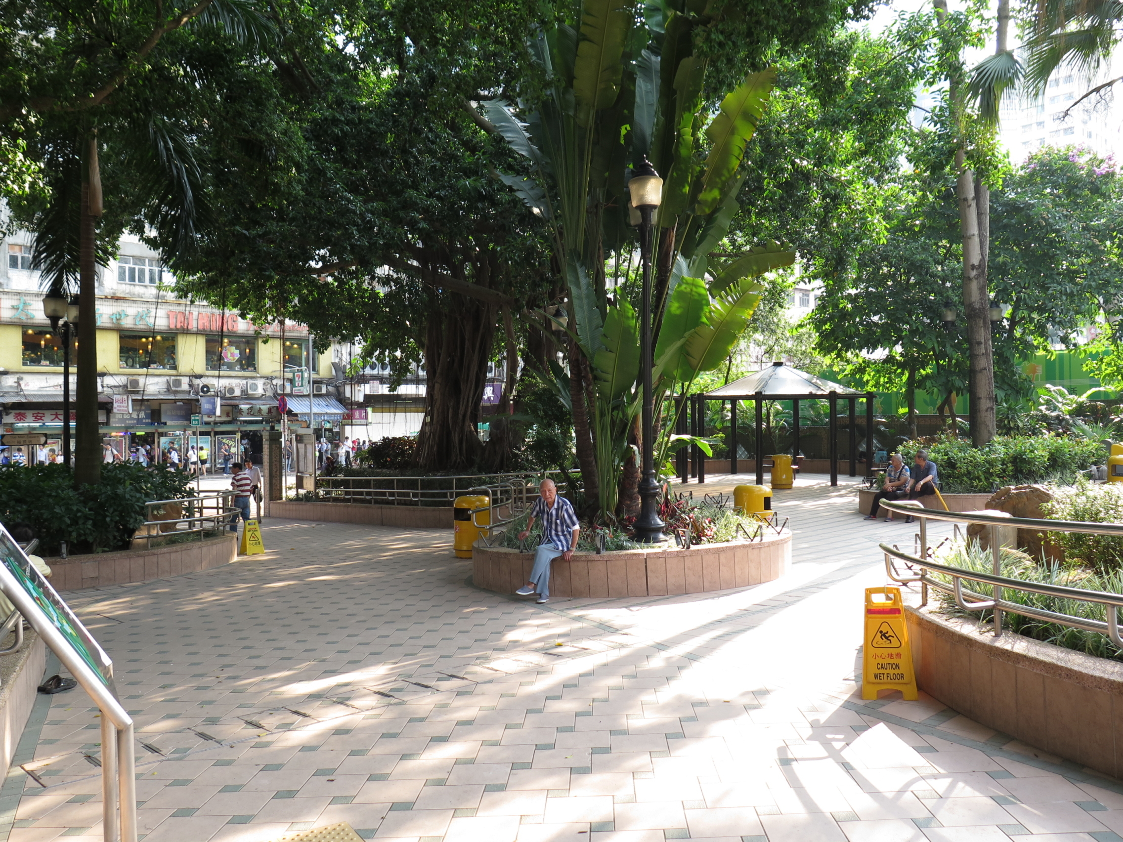 Yue Man Square